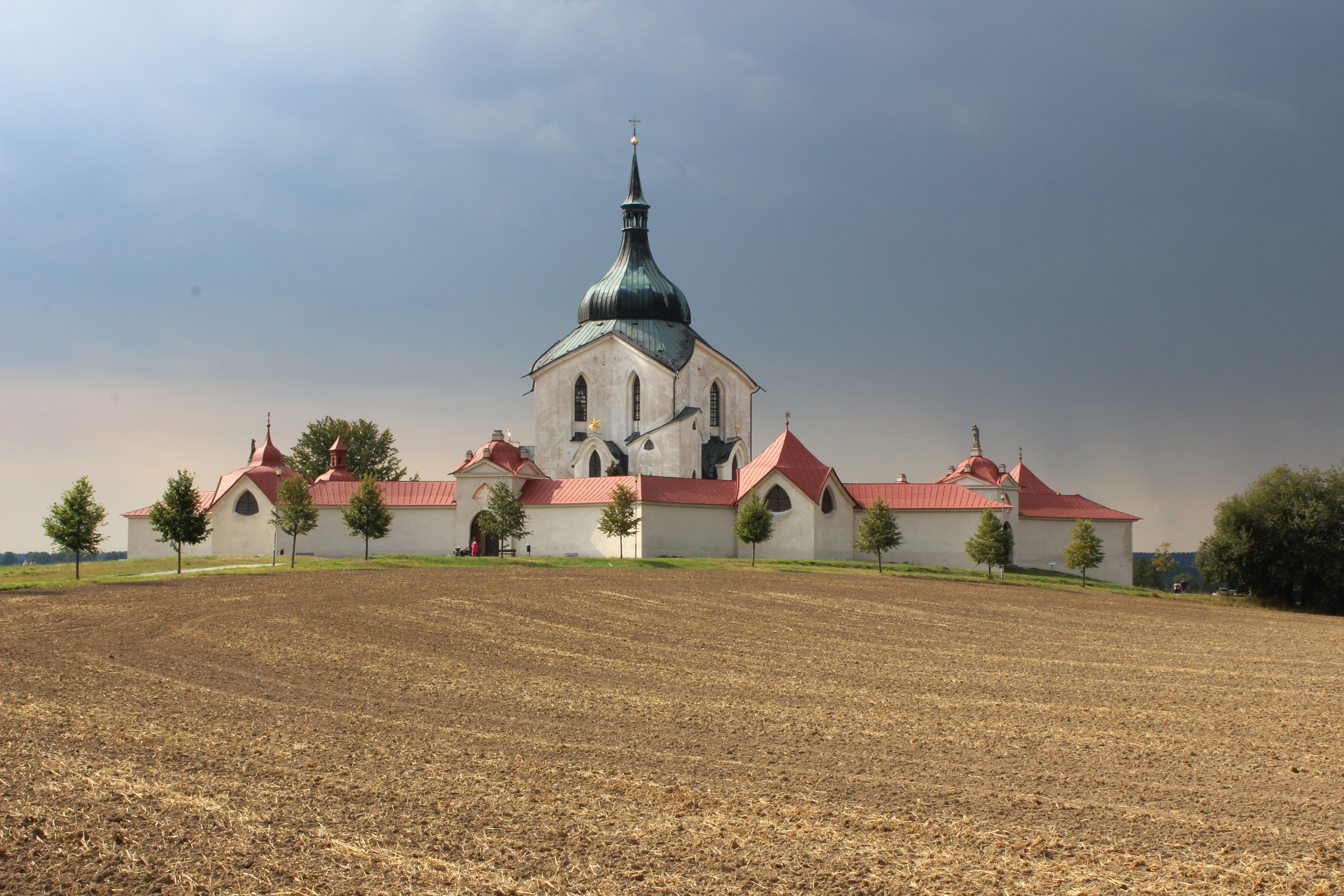 Poutní kostel sv. Jana Nepomuckého na Zelené hoře.